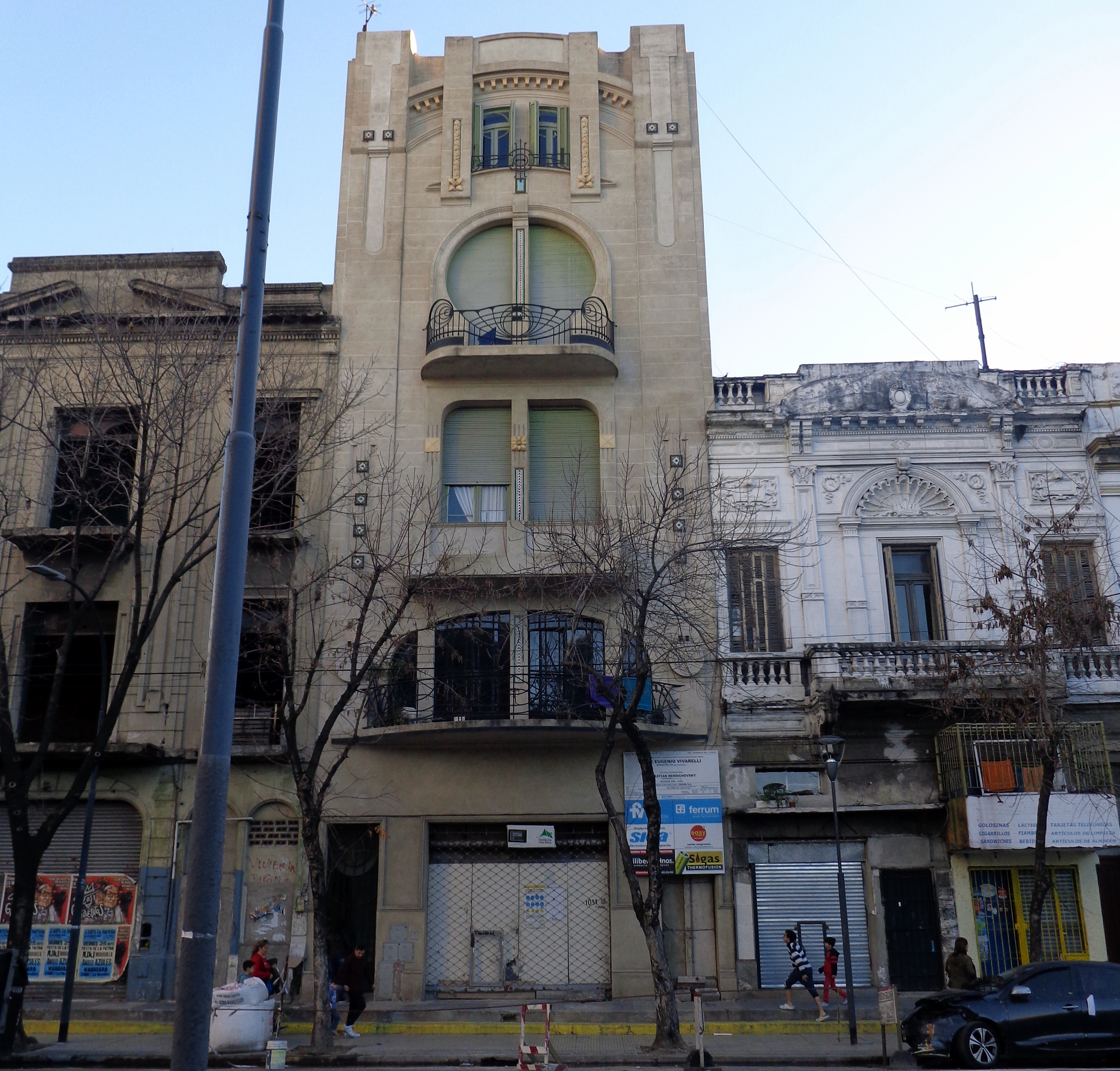 Almirante Brown 1039-41, La Boca, Buenos Aires, Argentina. Obra del Arquitecto Alfred Massüe (1860–1923).